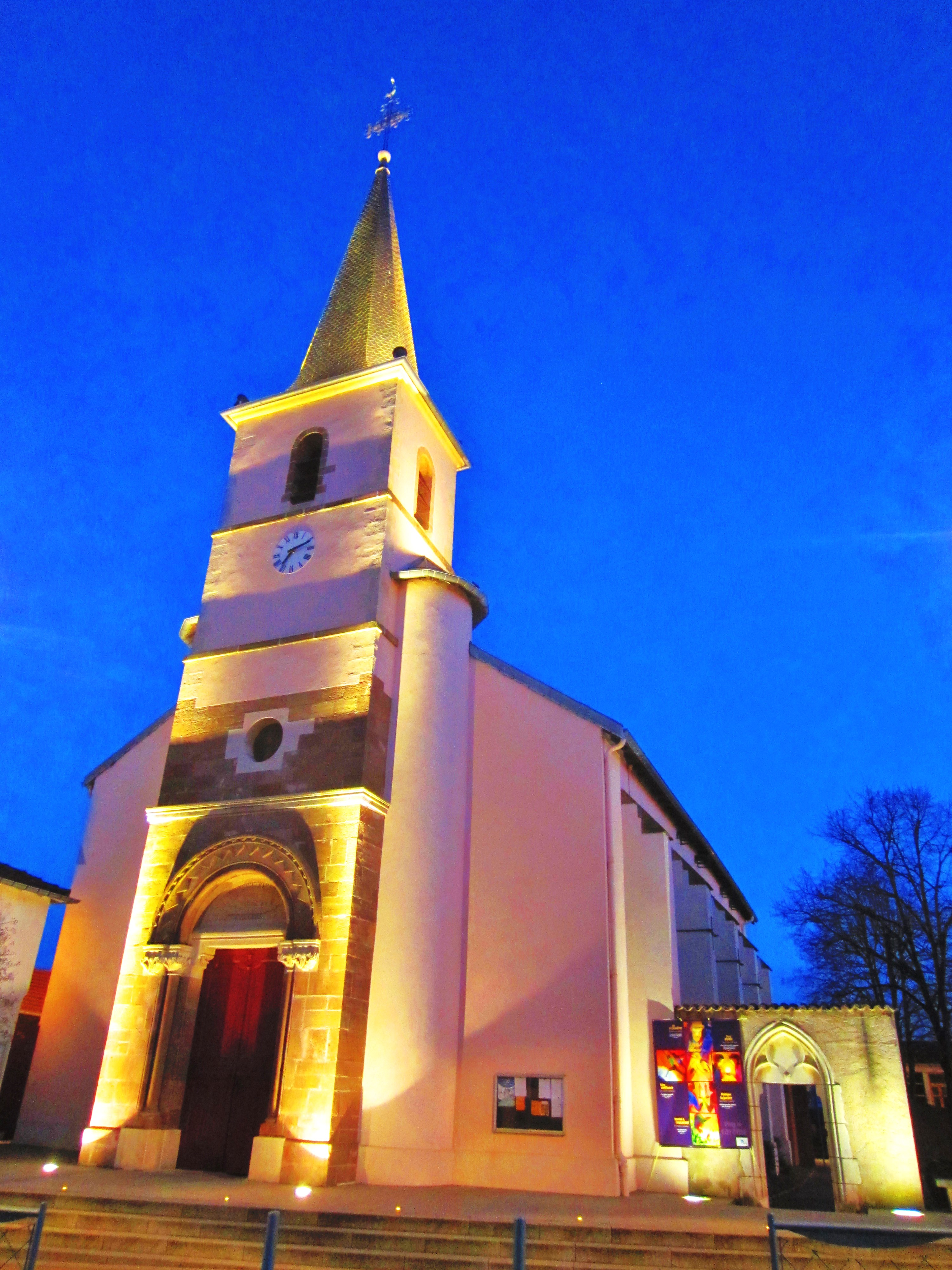 Heillecourt eglise